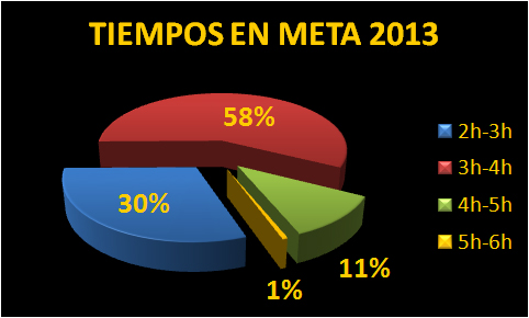 Estadisticas